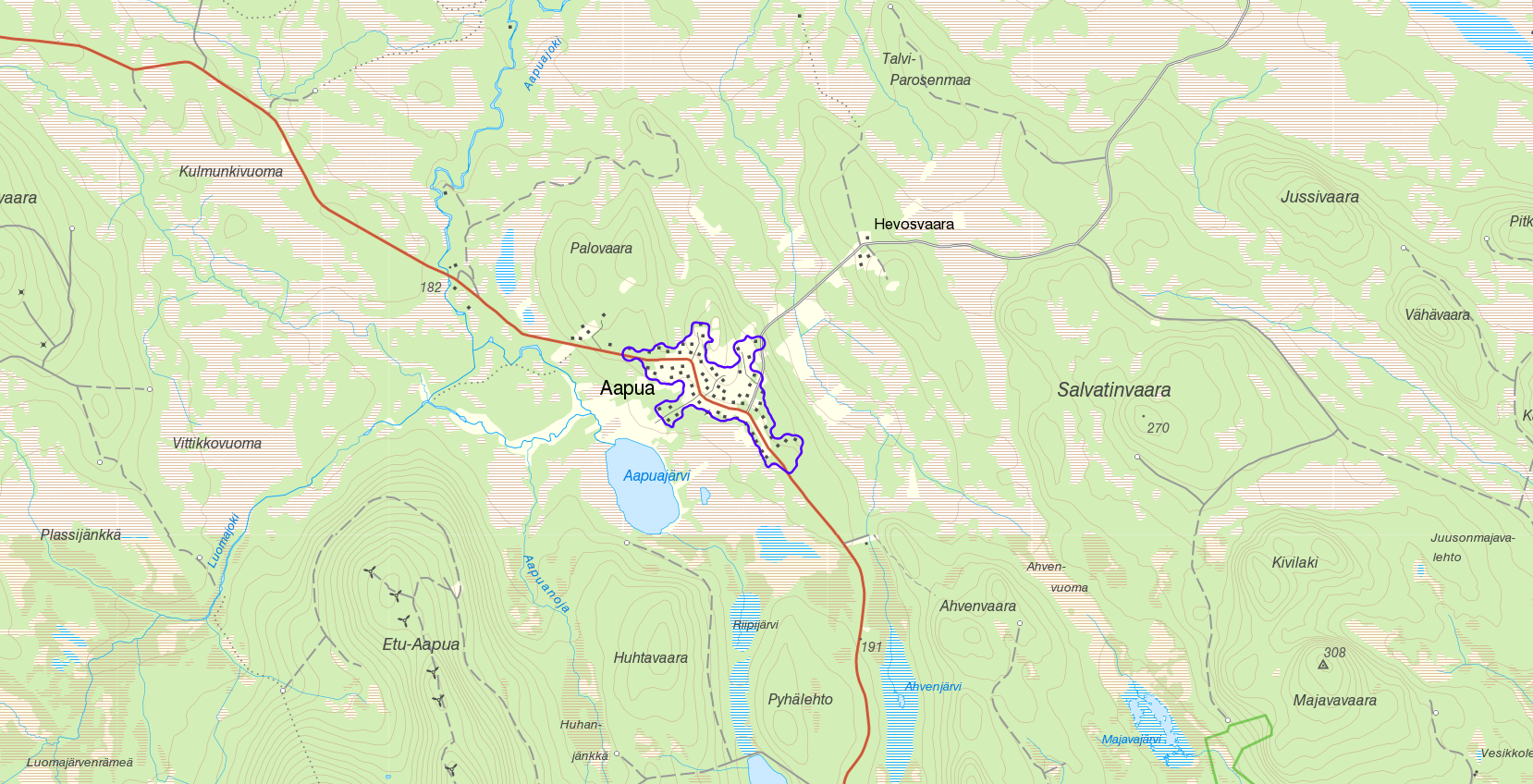 Småorten Aapua med gränserna från Statistiska centralbyråns småortsavgränsning 2015 i lila. Bakgrundskarta från Lantmäteriet, skala 1:30 236.